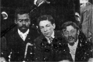 Presencia de Emiliano Zapata en el estado de Hidalgo